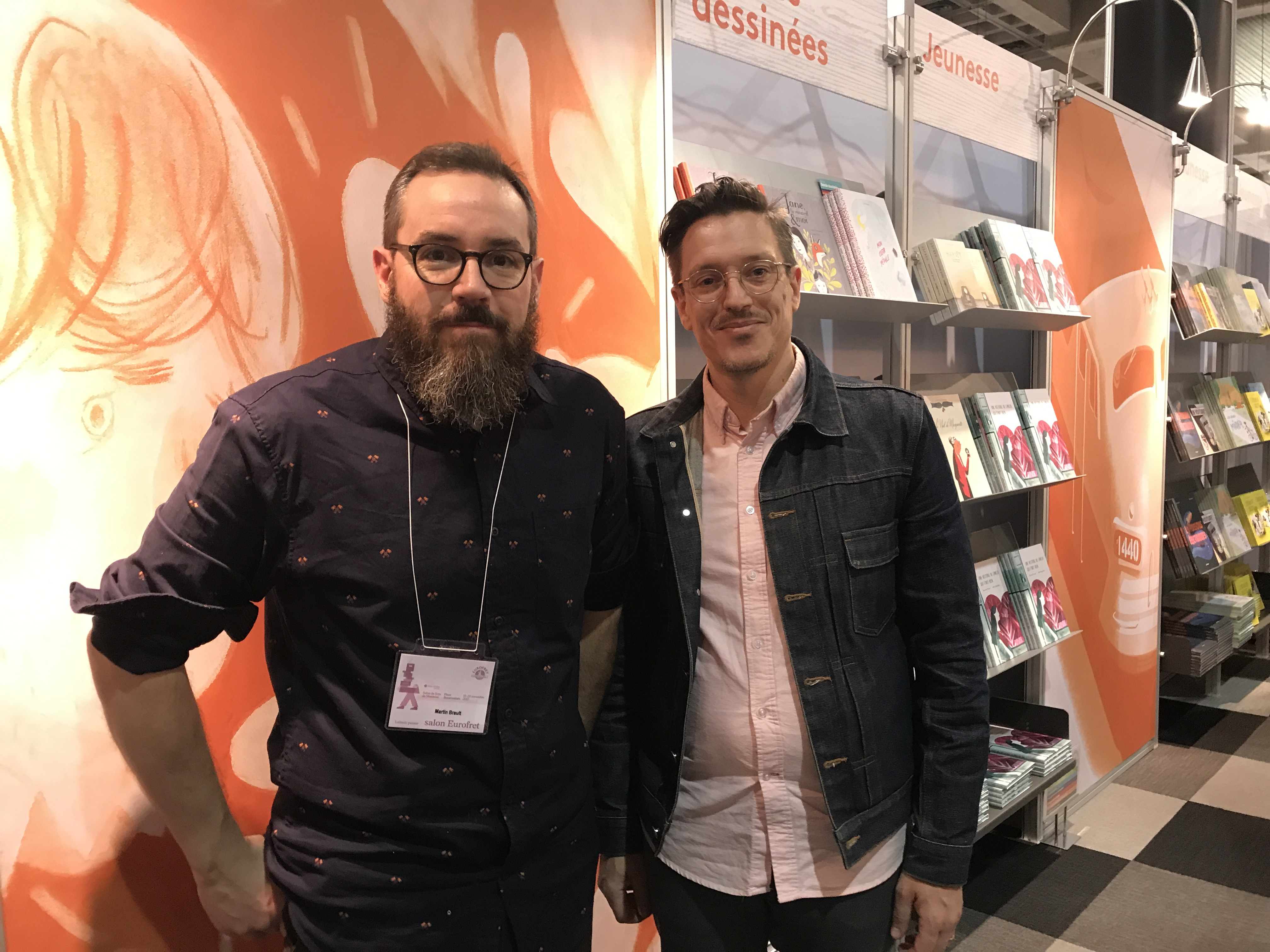 Martin Brault et Frédéric Gauthier - Éditions La Pastèque